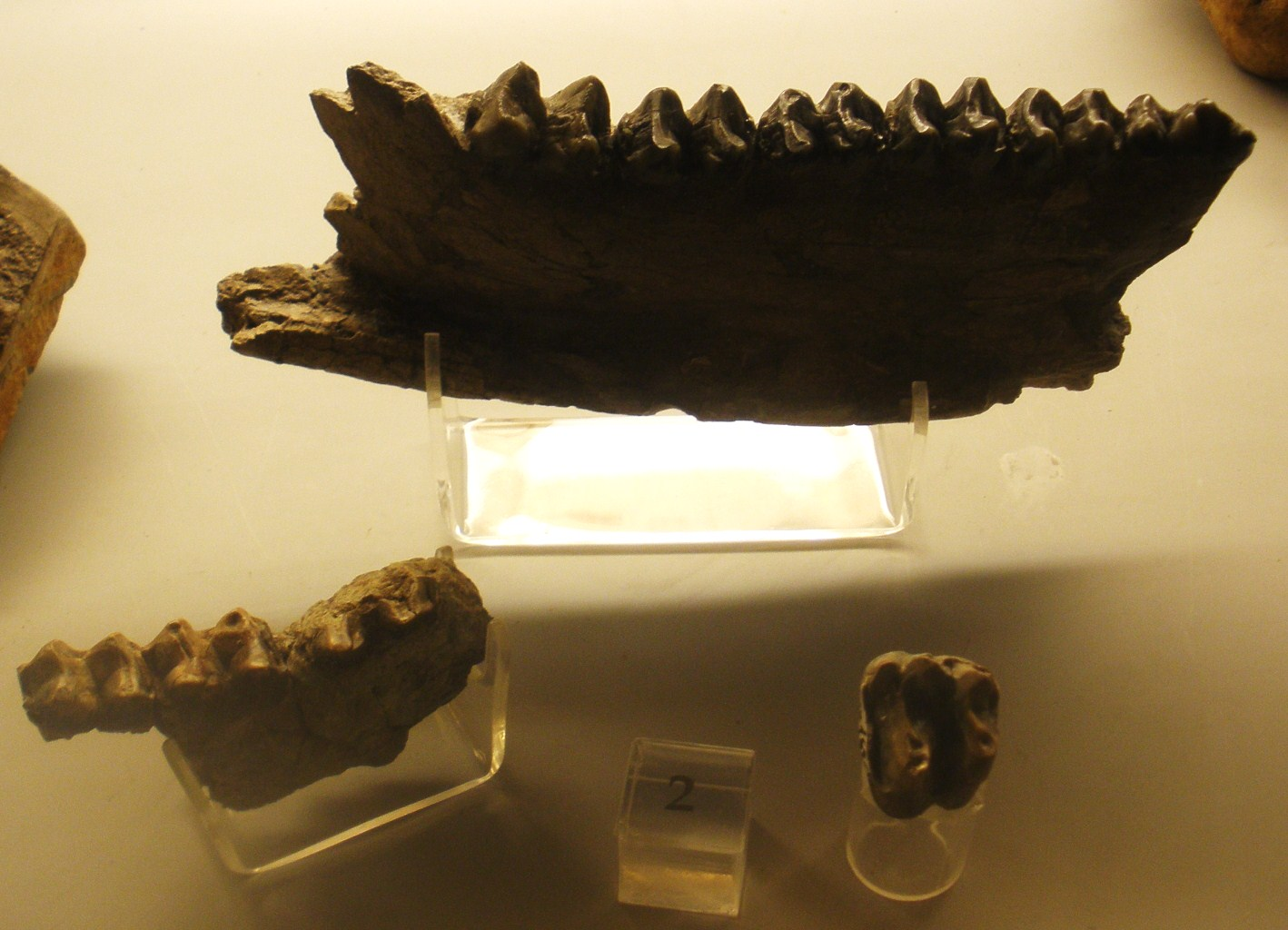 Fossil of Tapirus, an extinct mammal -- Topok the picture at Museo di Paleontologia di Firenze